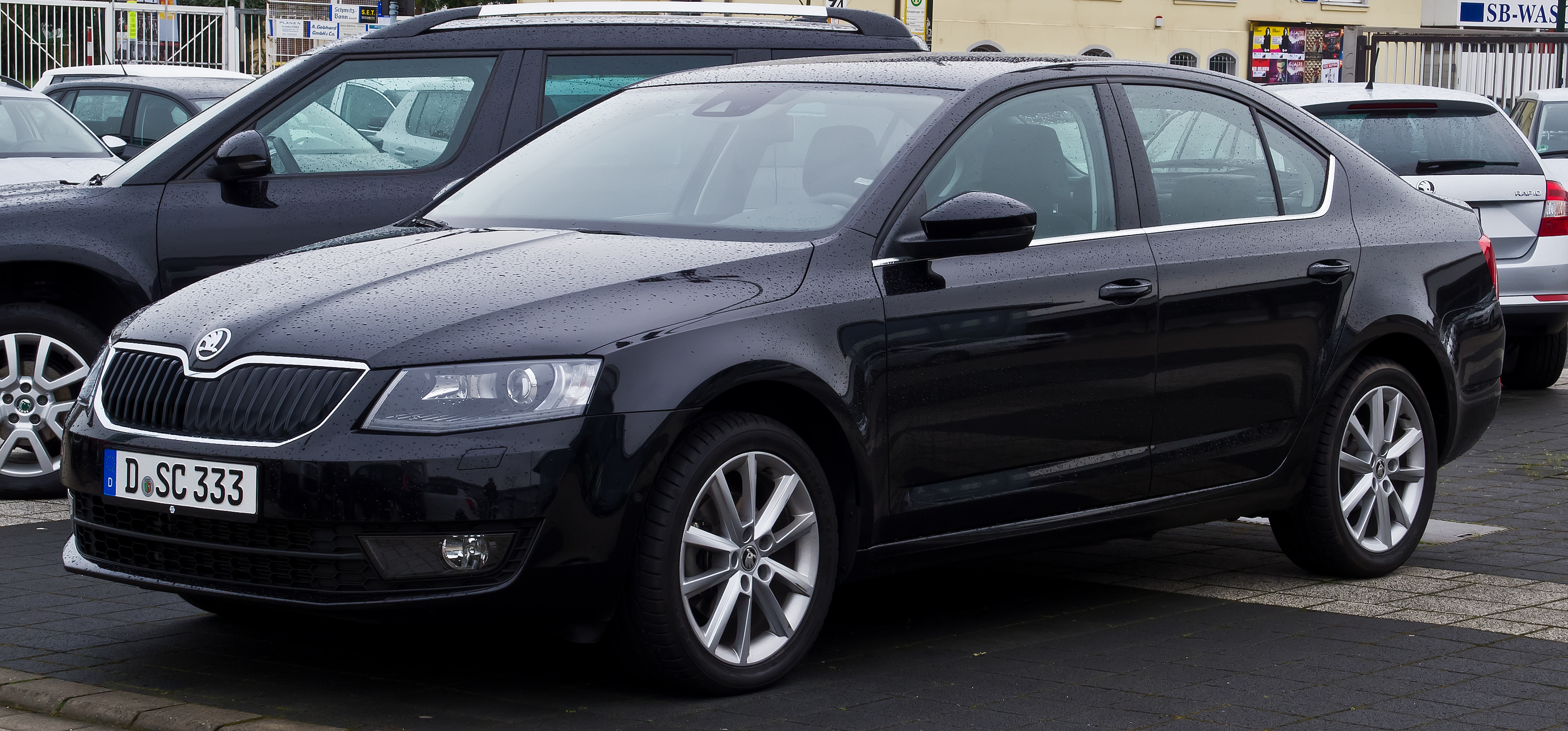 Skoda Octavia 2.0 TDI Elegance (III)